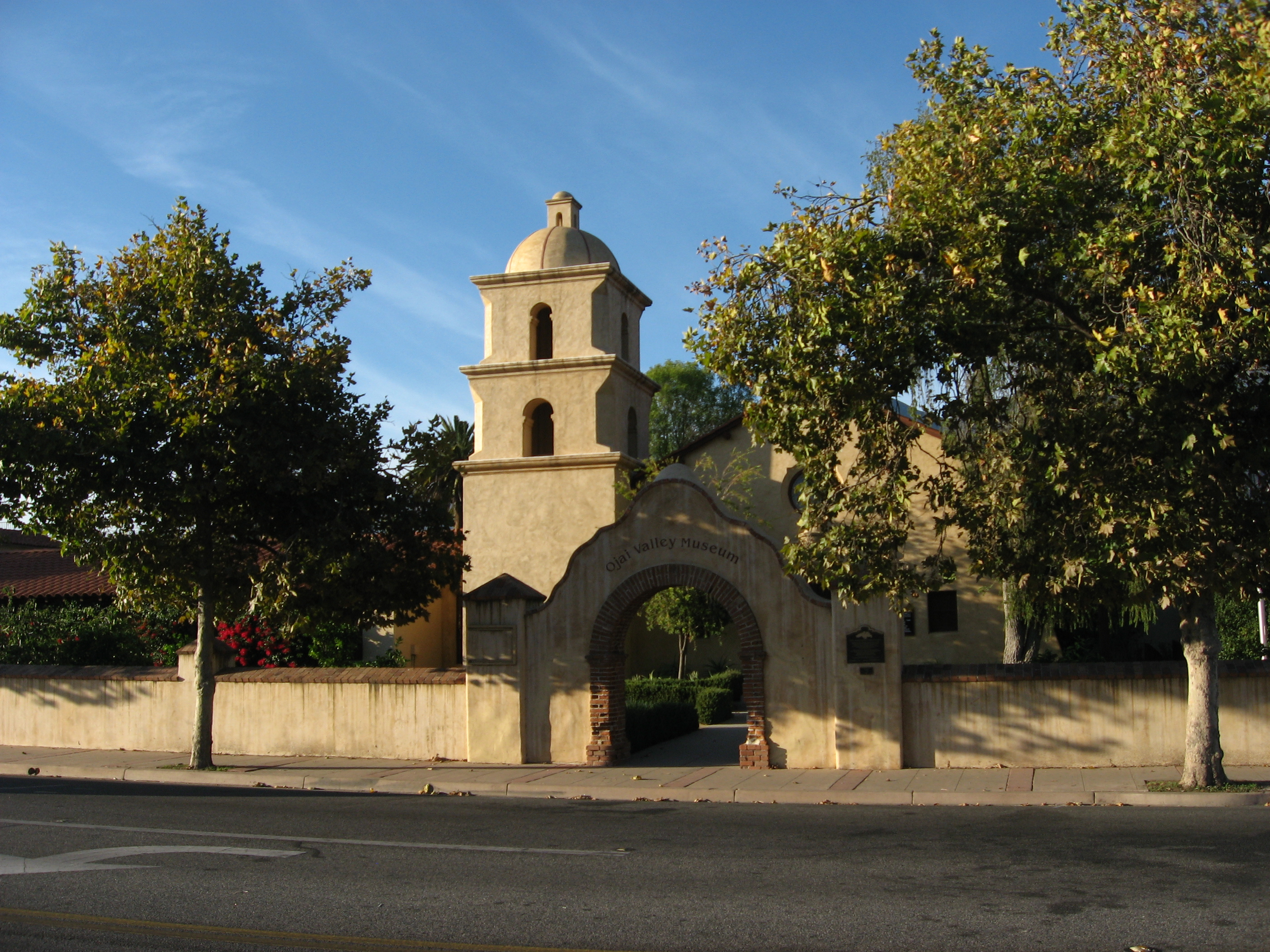 Ojai Valley Museum, Ojai CA